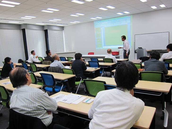 桝田先生講義風景。